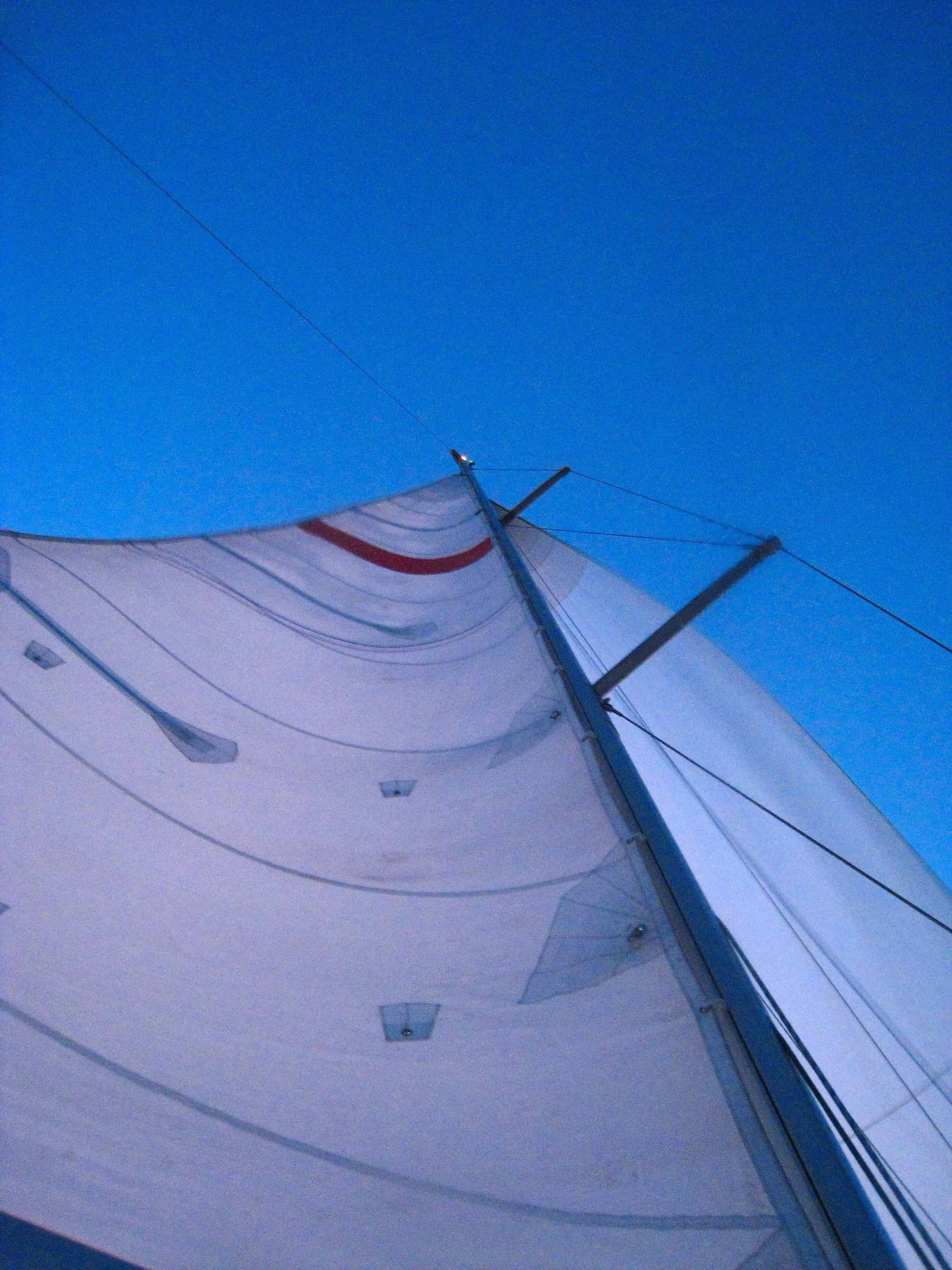 creux d'une voile (avec la bande rouge des Glénans)